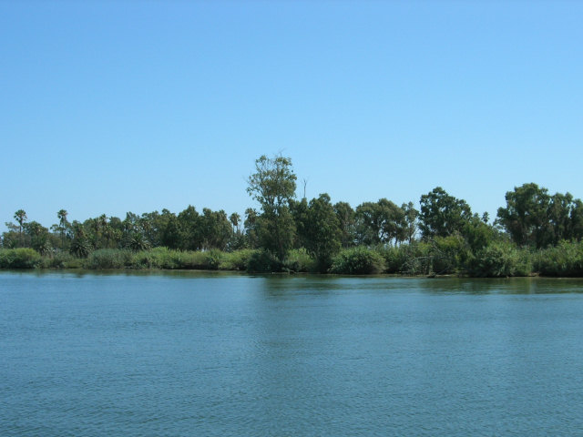 Illa de Buda